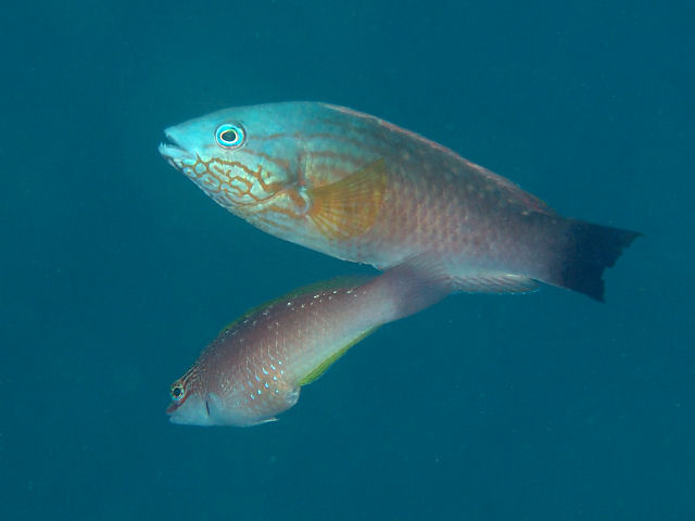 ホシササノハベラ Pseudolabrus sieboldi